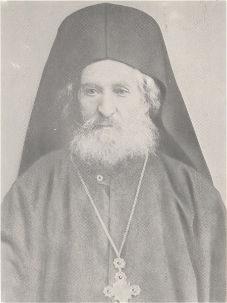 Методий Черепишки.